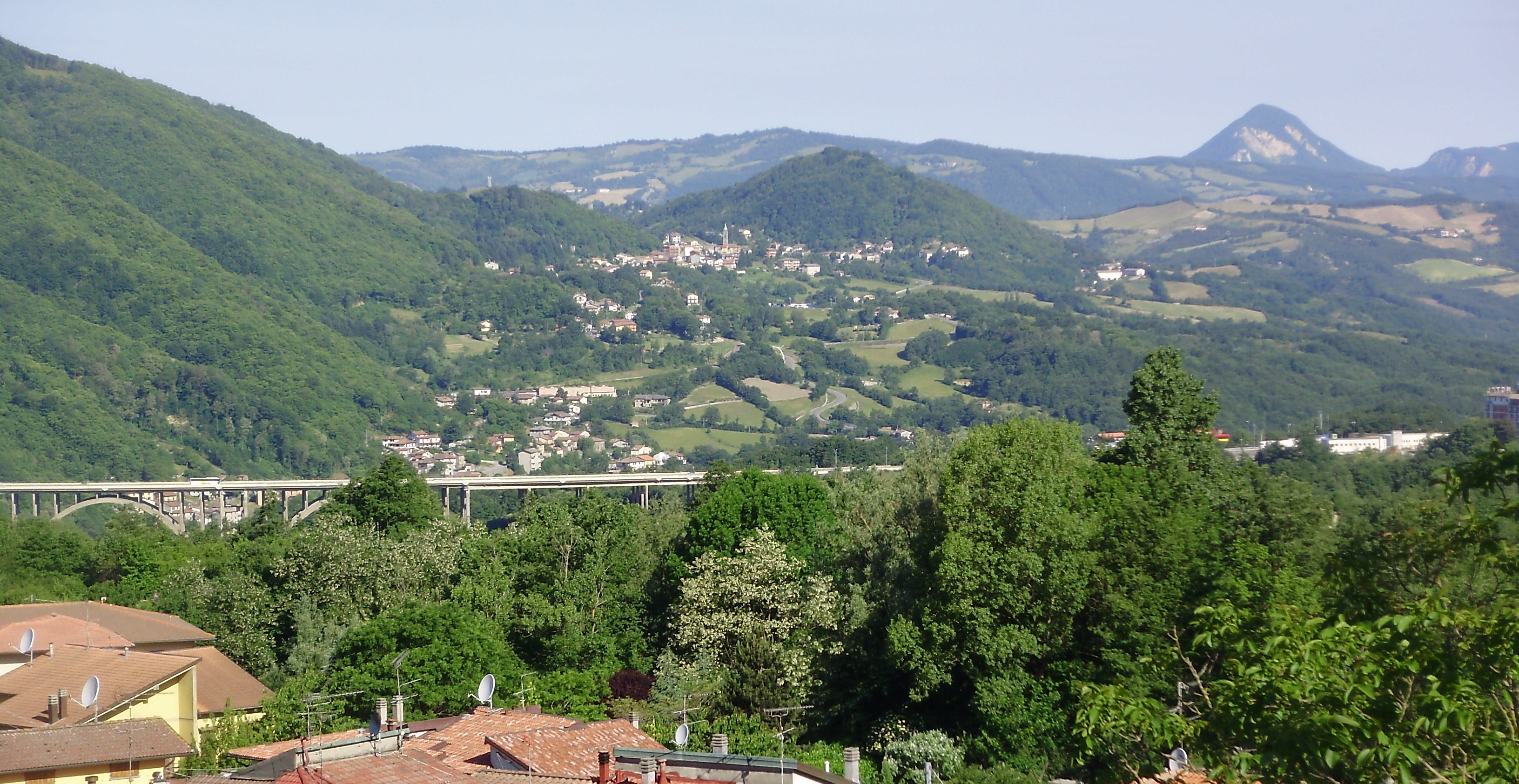 Panorama territorio Baragazza